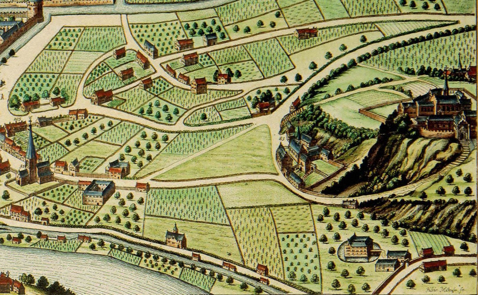 extrait : Cornillon, les prémontrés et Saint-Remacle au Pont